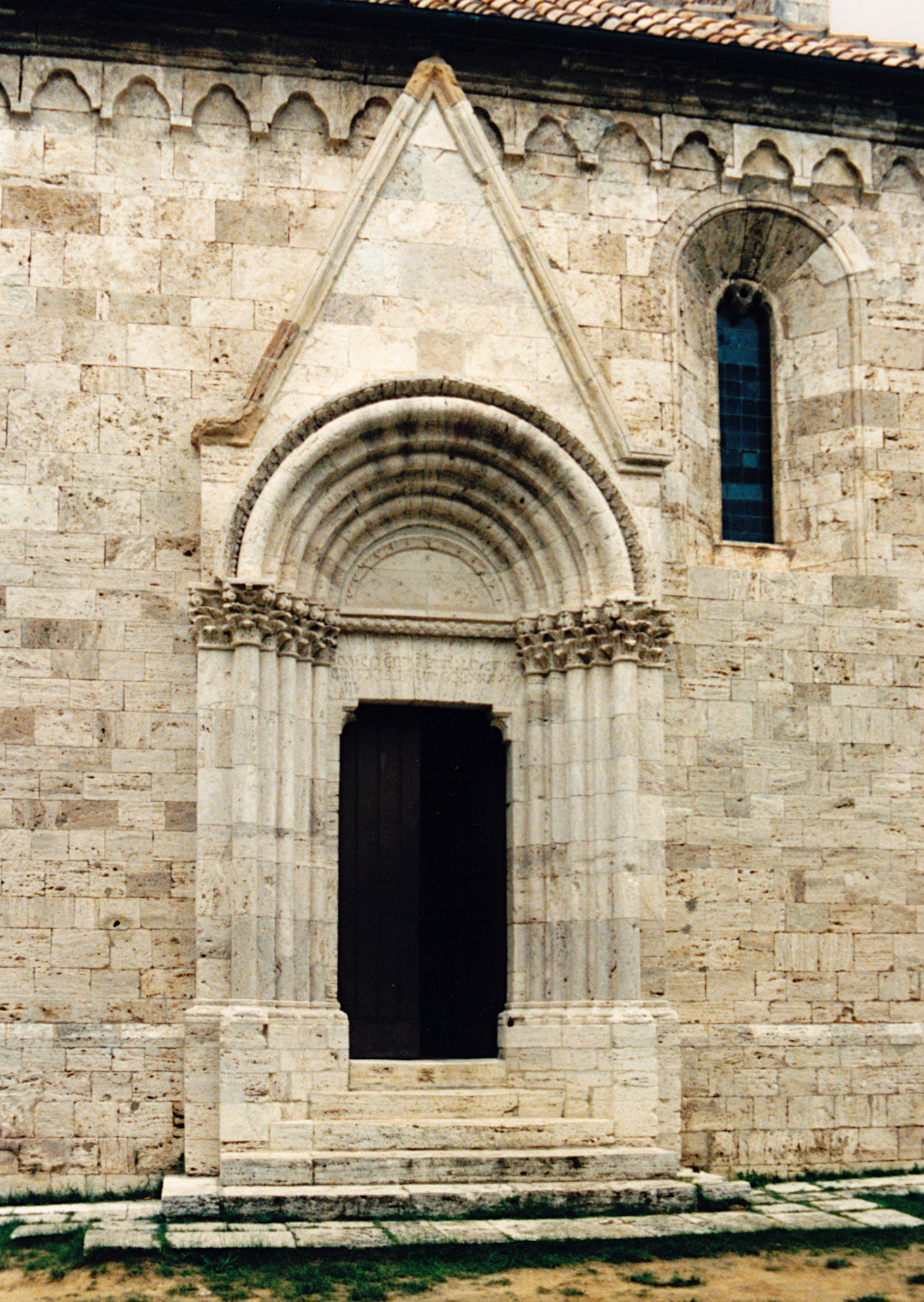 Italie - Toscane - Collégiale de San Quirico d'Orcia